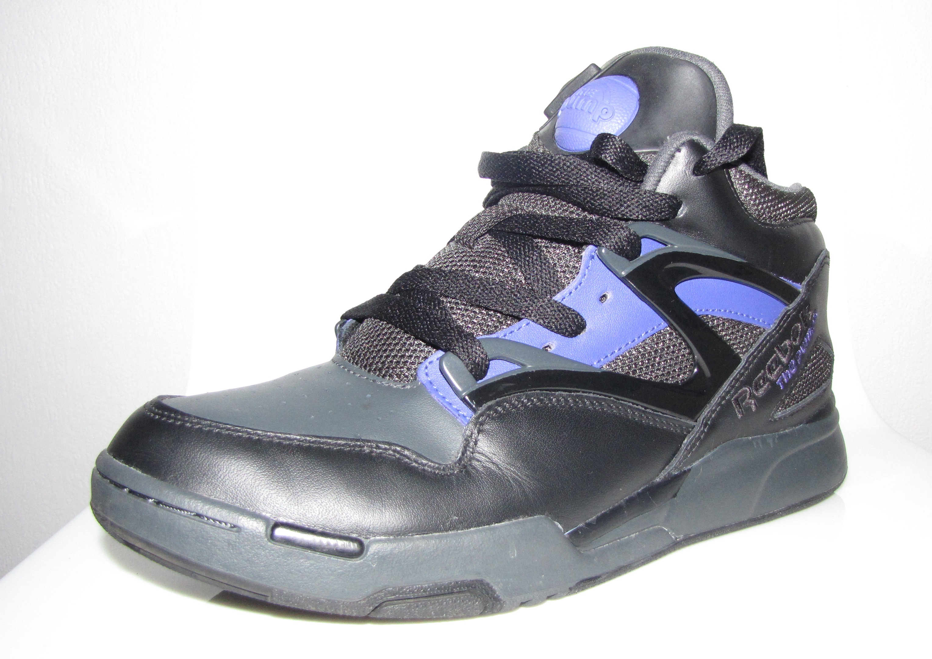 Reebok Omni Zone